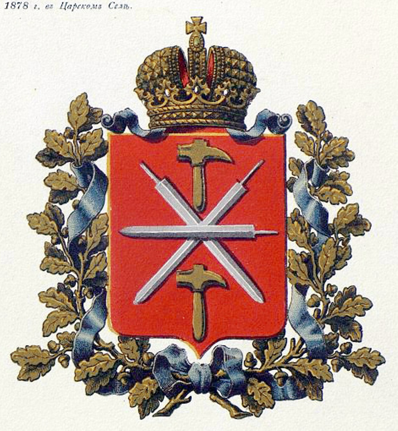 Official Russian Empire coat of arms Tula Governorate. Герб Российской Империи Тульской губернии в Гербовнике МВД. Утверждён Императором Всероссийским Александром Вторым в 1856 году.